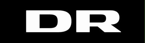 DR's nye logo fra 2013